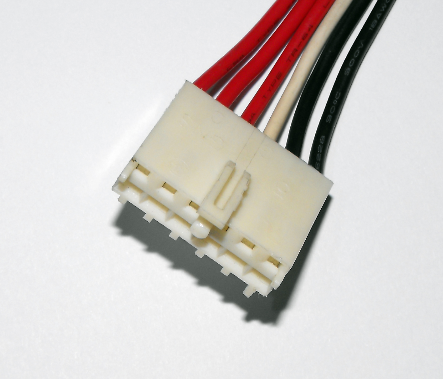 Wtyczka Atx-apc